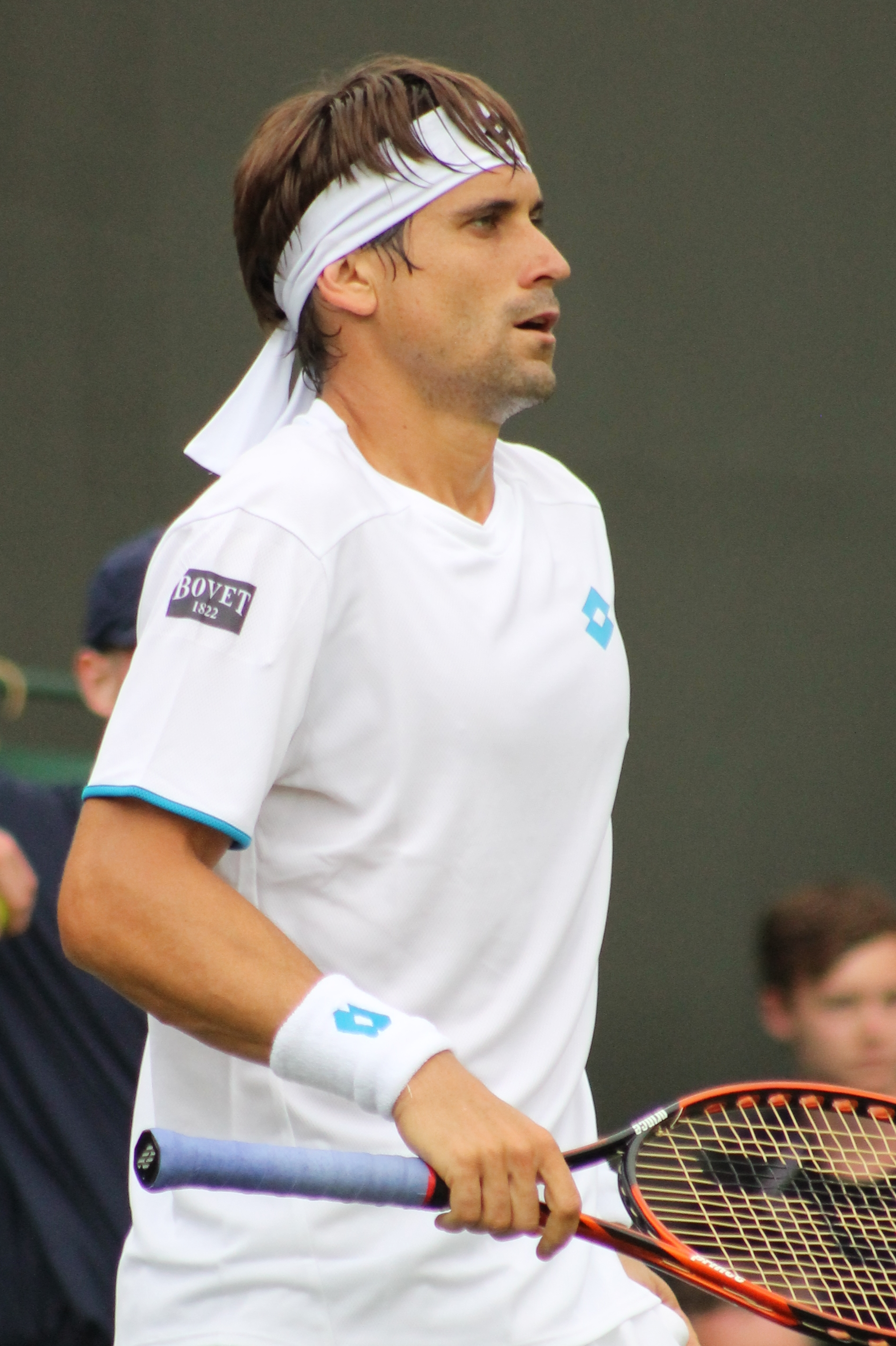 Ferrer WM14 (11)